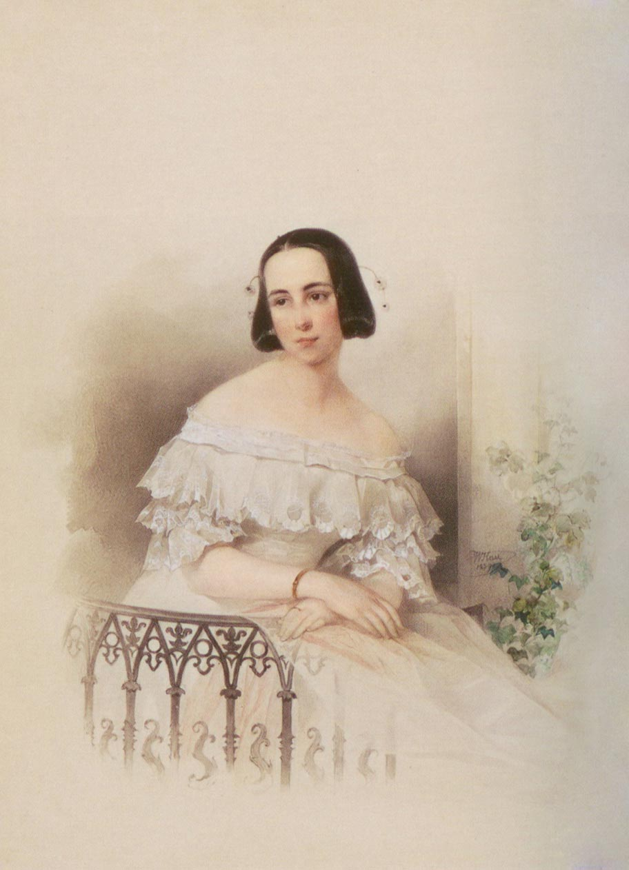 Александра Сергеевна Урусова (1814 - 1865), дочь графа С.С.Уварова и Е.А.Разумовской, с 1837 года была замужем за графом Павлом Александровичем Урусовым (1807-1886).